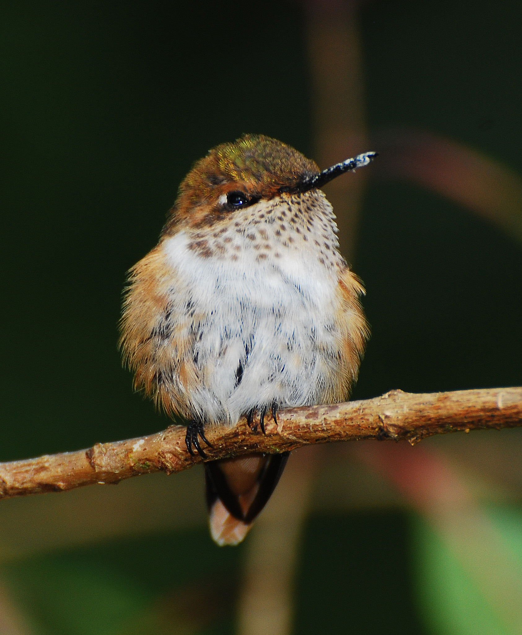 Scintillant Hummingbird (Selasphorus scintilla) at Savegre Lodge, Costa Rica, 080227.